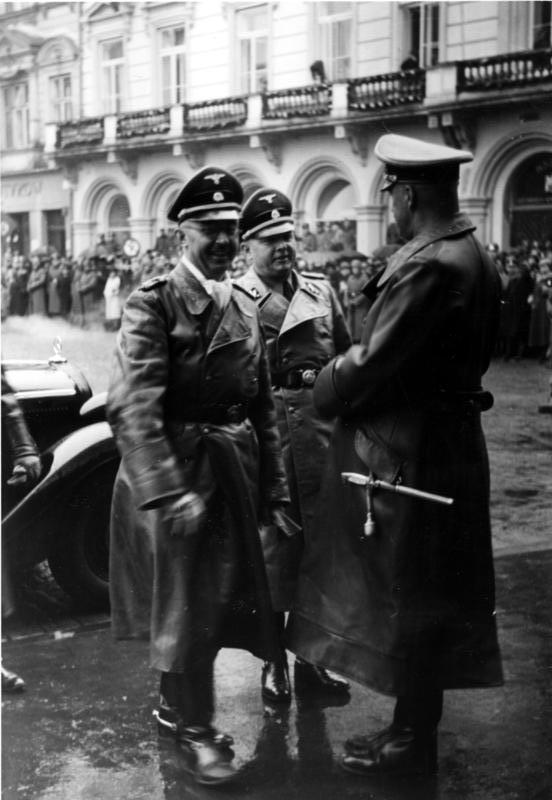 Ankunft des Reichsführer der SS Himmler in Krakau v.r.n.l.: Himmler, Streckenbach, [?]